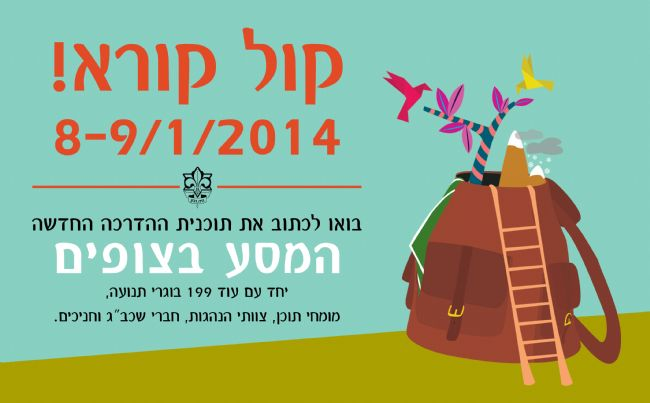 קול קורא למשתתפי כנס הכתיבה לתוכנית ההדרכה של תנועת הצופים העבריים בישראל